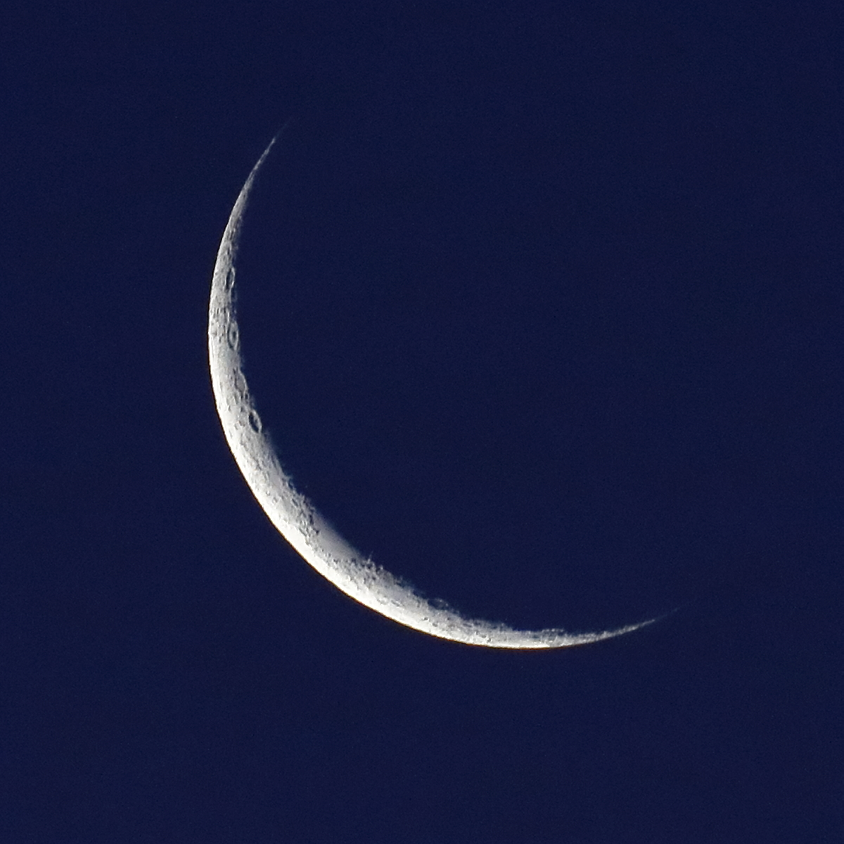 Lake Wendouree. Ballarat.